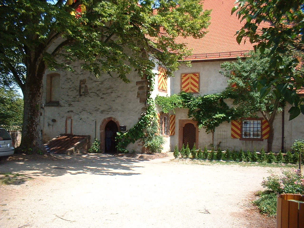 Schloss Staufenberg at Durbach Germany